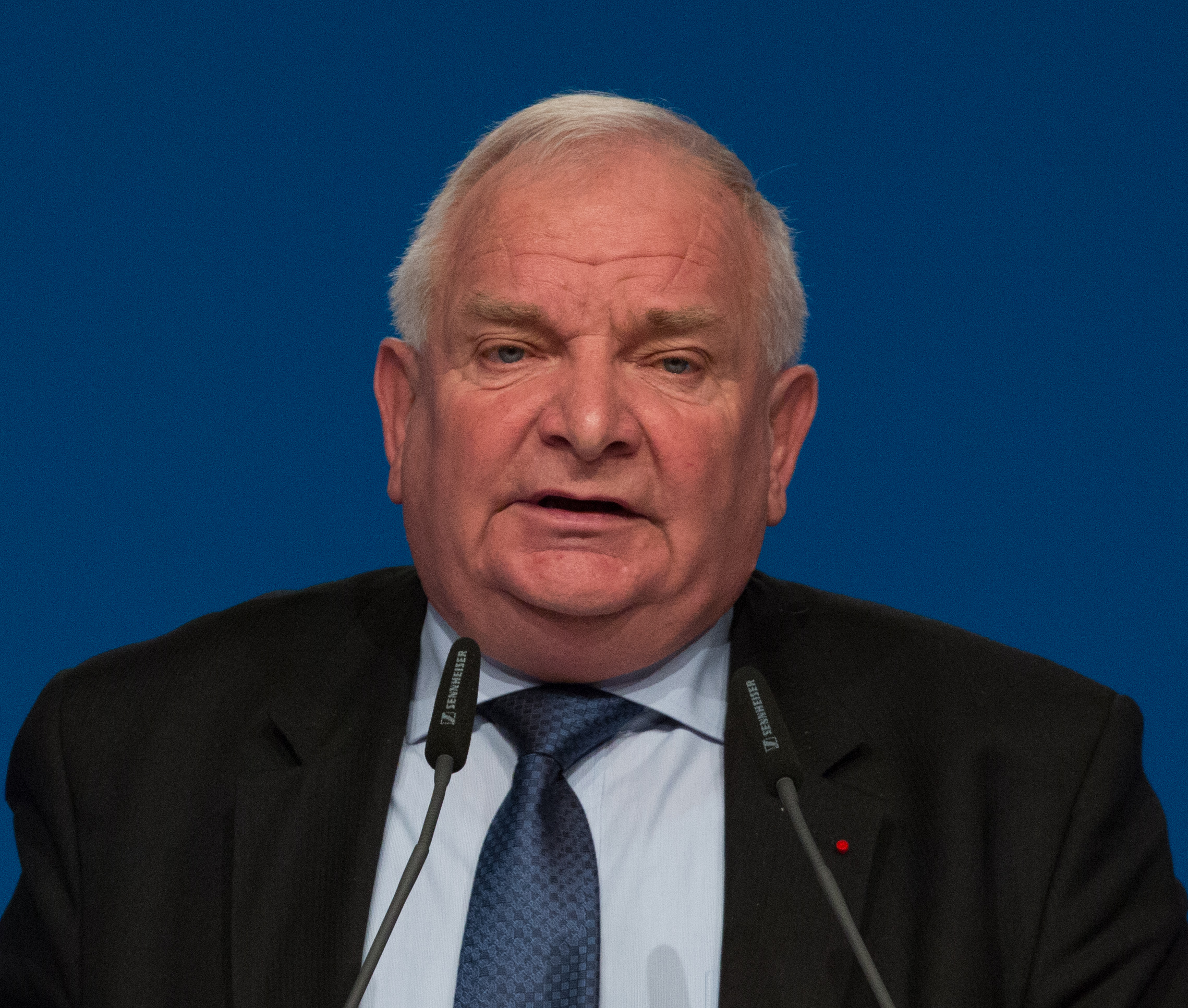 Joseph Daul auf dem 29. Parteitag der CDU Deutschlands am 6. Dezember 2016 in Essen, Grugahalle